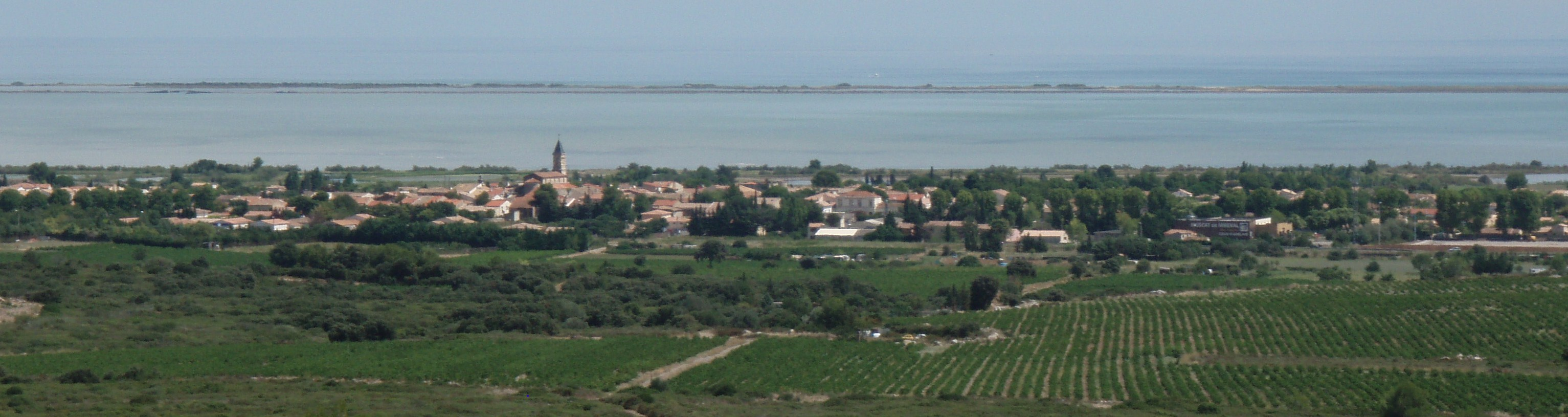 Village de Mireval (Hérault, France) et une partie de son vignoble